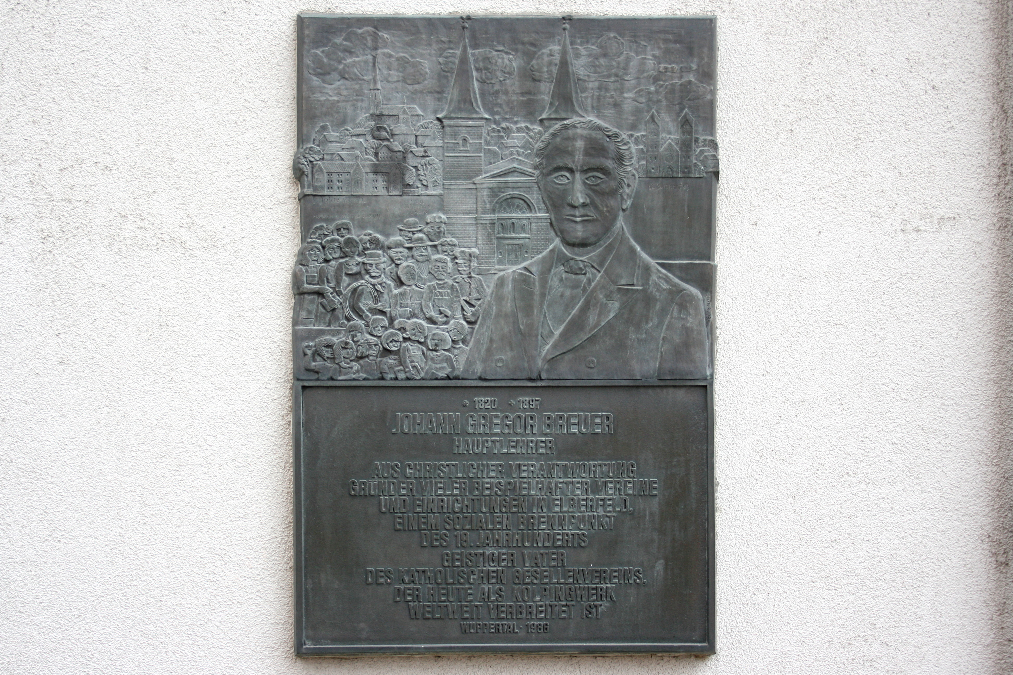 Laurentiusplatz in Wuppertal